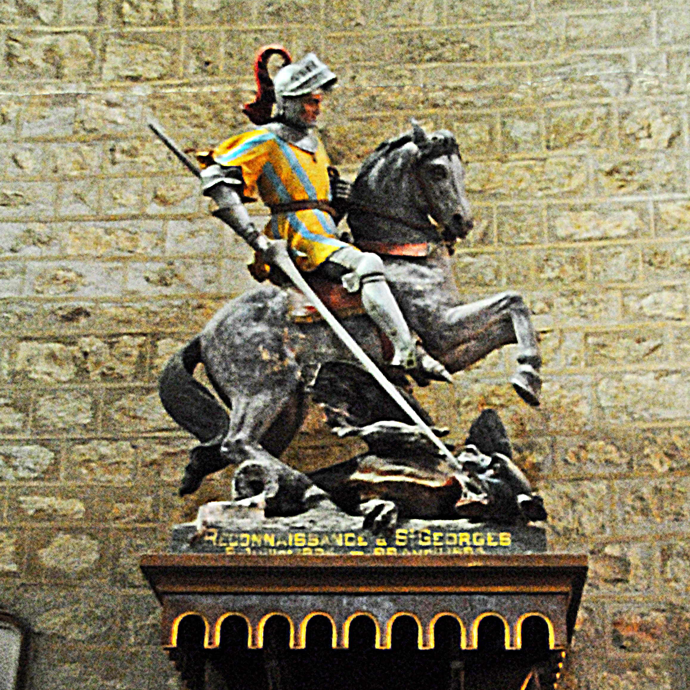 Ste-Croix de Veauce, Skulptur St-Georges